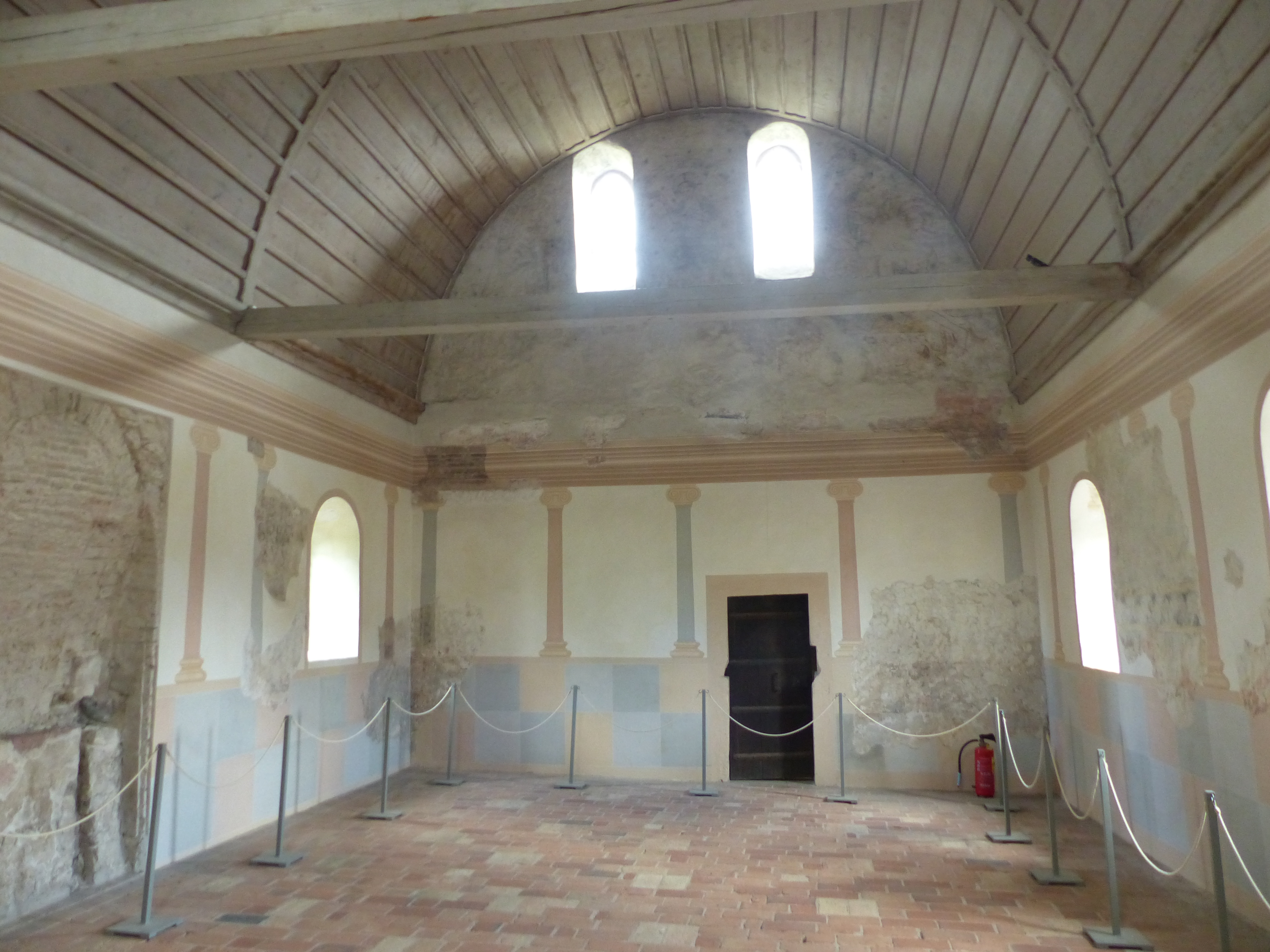 Innenraum der Torhalle Lorsch